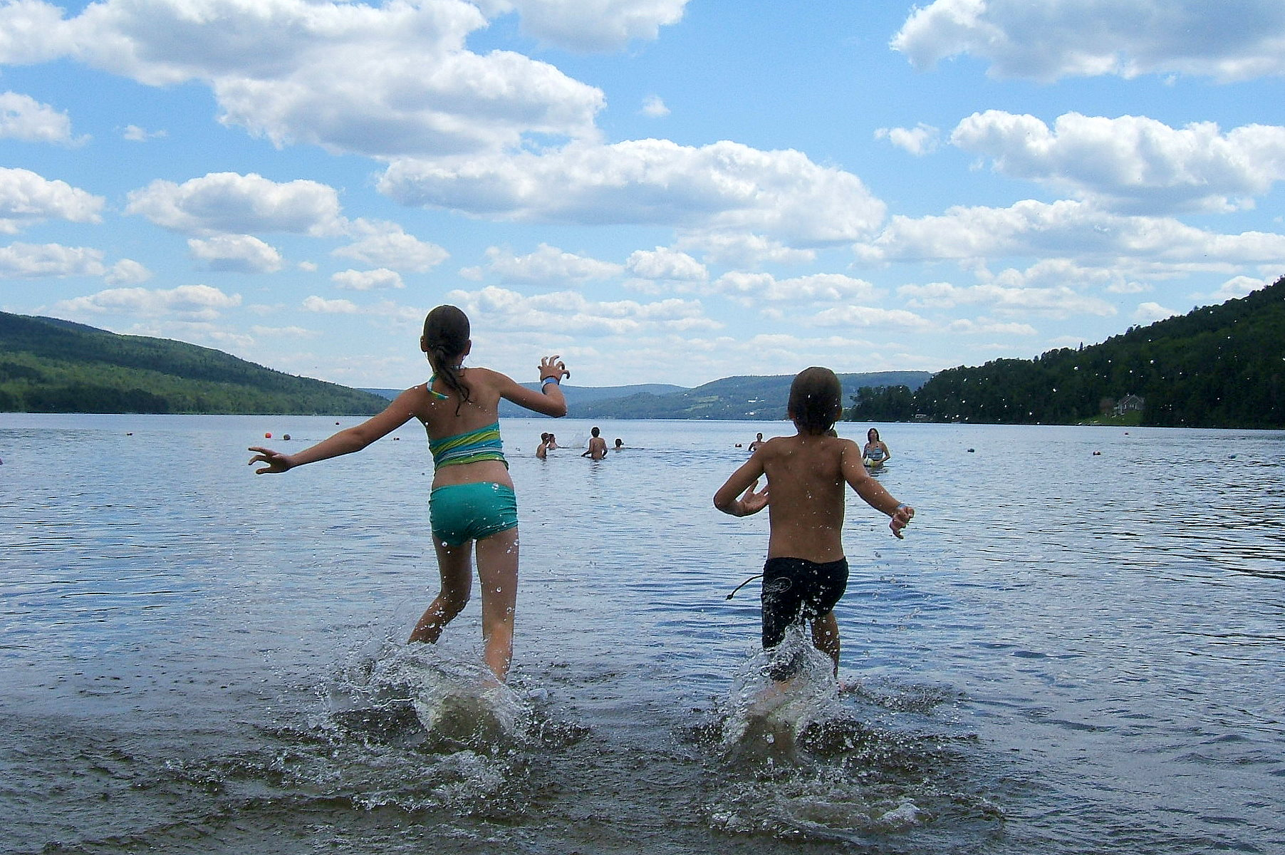 Plage municipale à Pohénégamook, sur le lac du même nom, au Témiscouata (Québec)